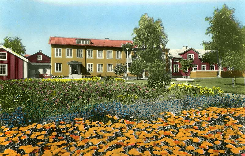 Landstingets Centrala Yrkesskola. Handkolorerad variant av ac01115.; Byggnadsverk; Skola; Utbildning och vetenskap